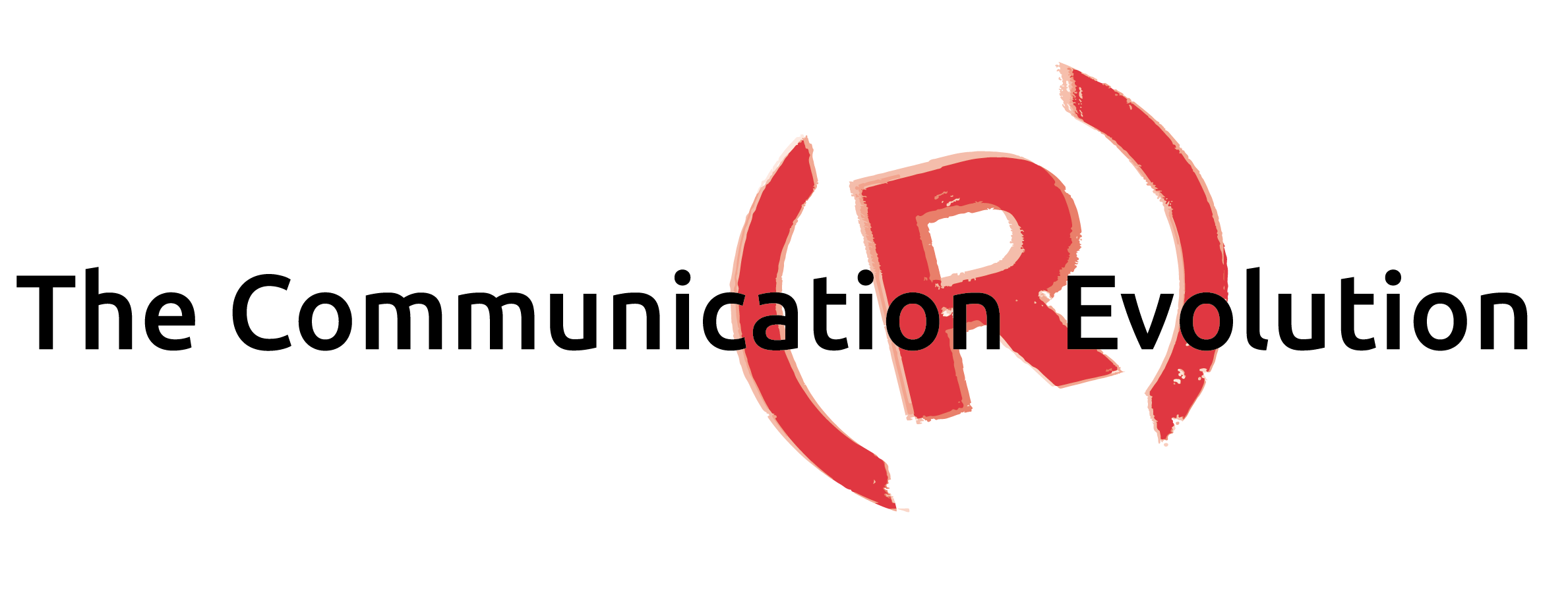 Logo do The Communication (R)Evolution